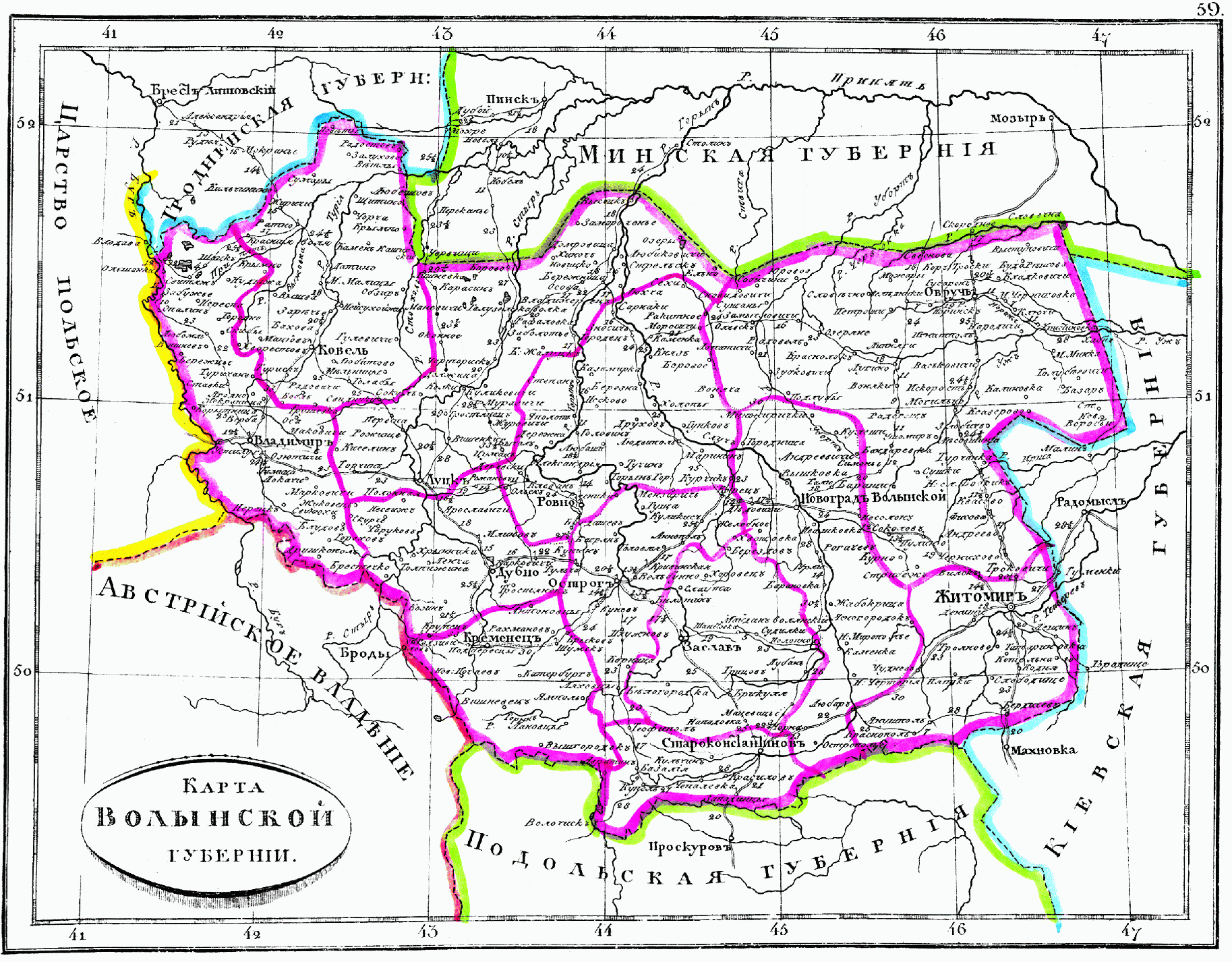 Карта Волынской губернии, 1835